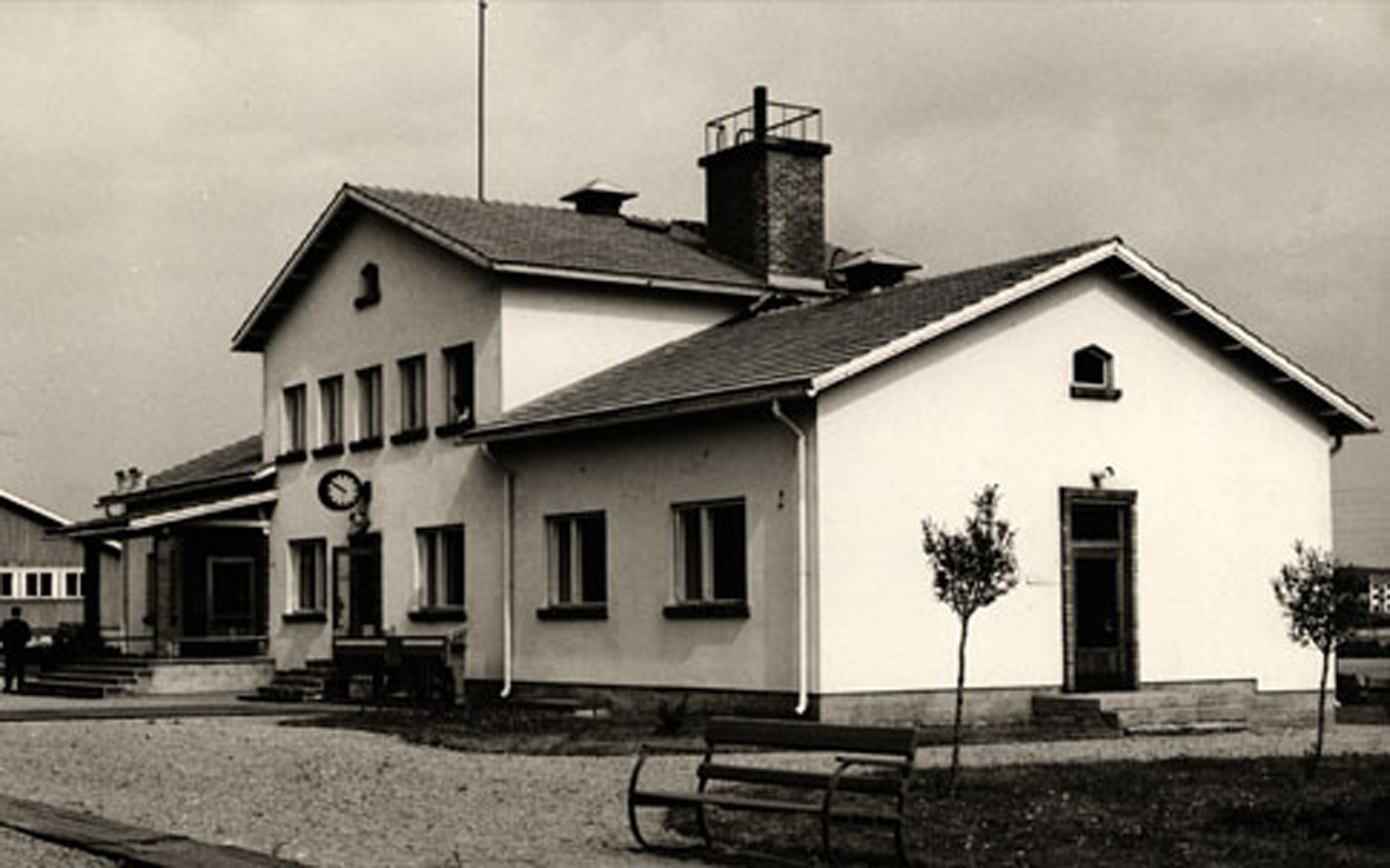 Suolahden rautatieasema. Näkymä kadun puolelta